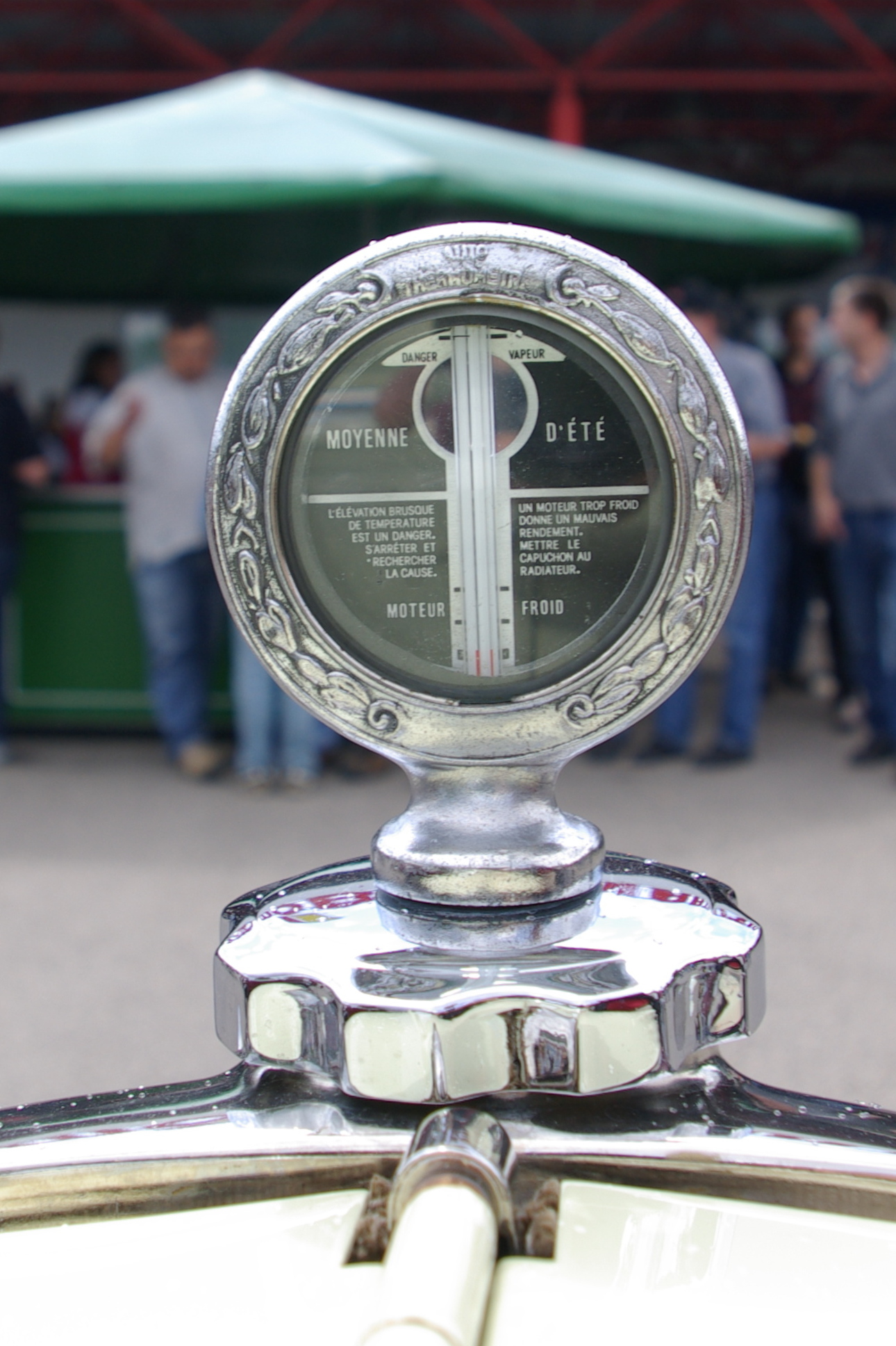 Citroen C4 Baujahr 1930 Leistung 30 PS Temperaturanzeige